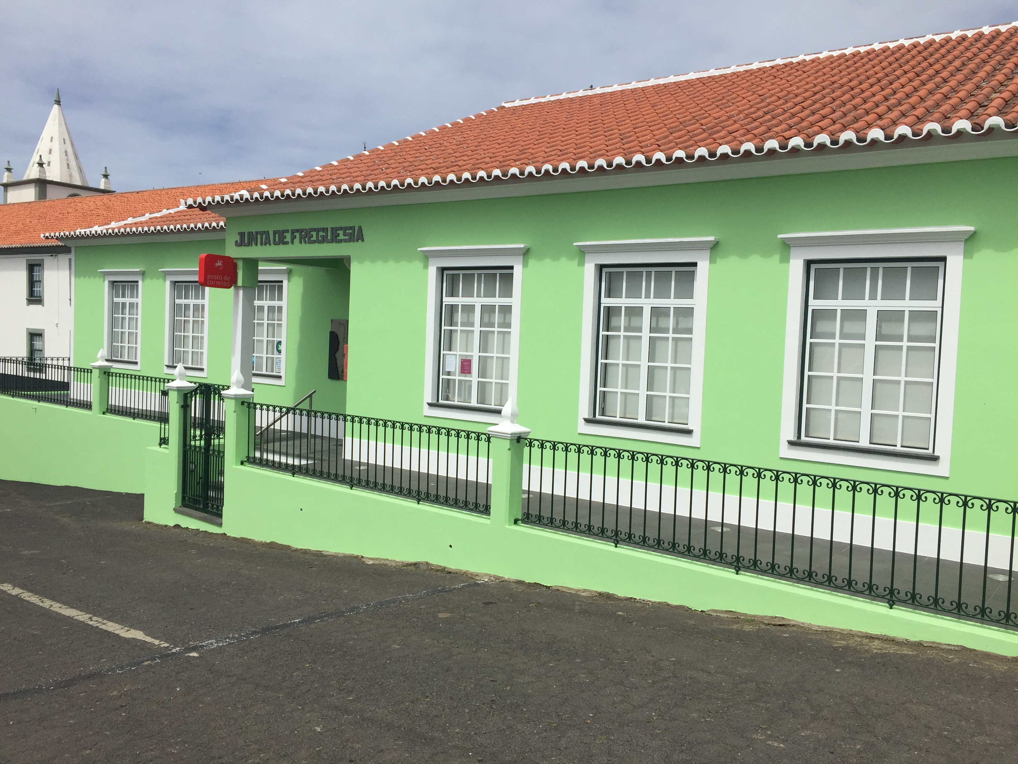 Edifício da Junta de Freguesia do Raminho